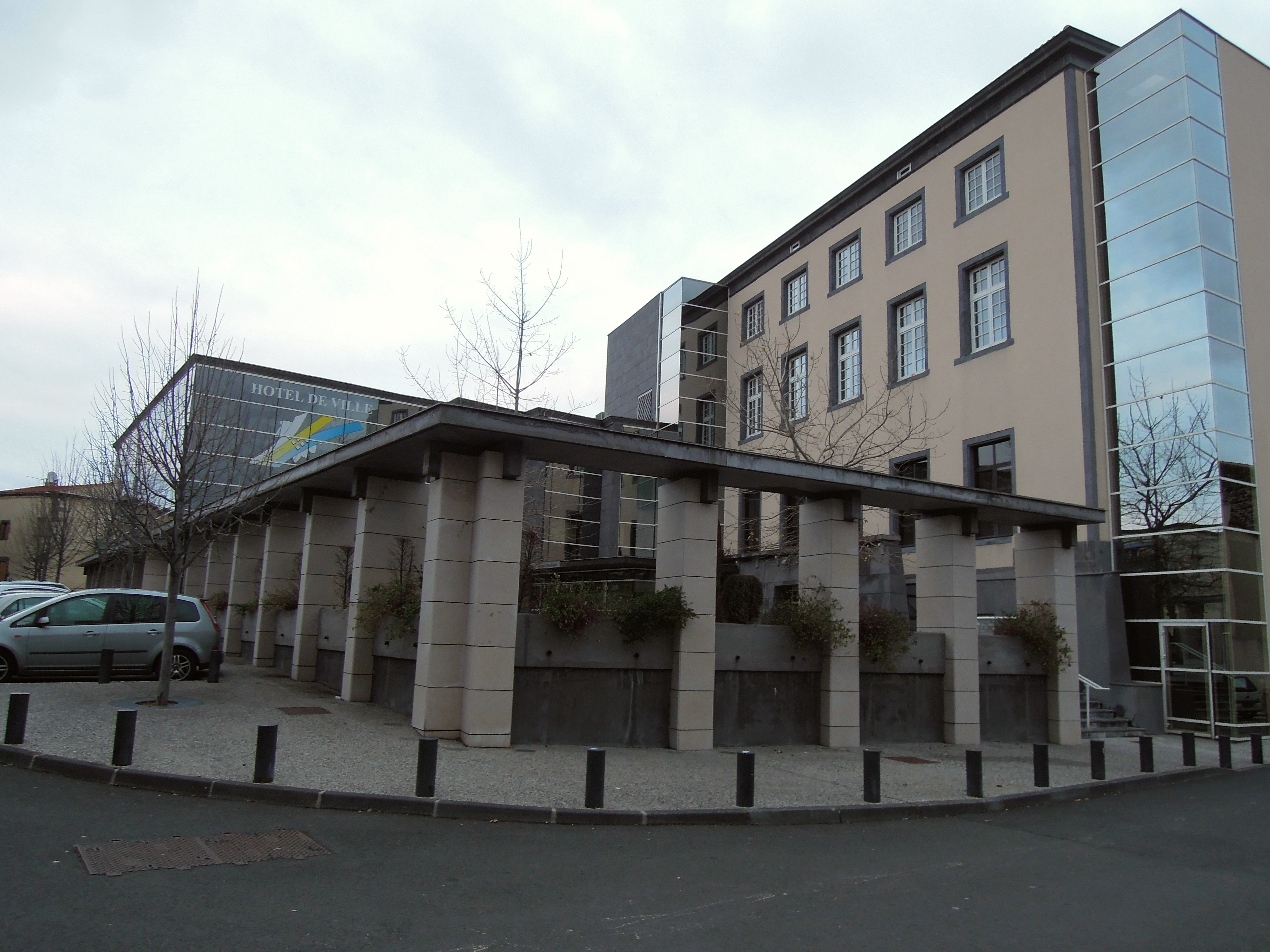 Hôtel de Ville d'Aubière, Puy-de-Dôme.